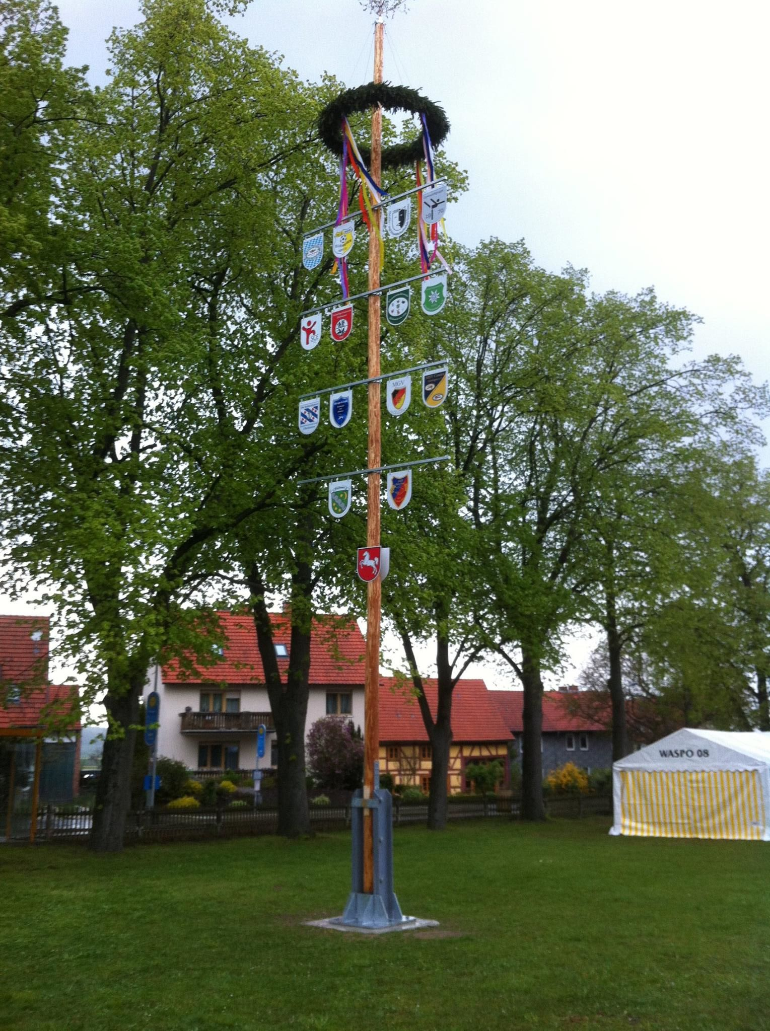 Elliehäuser Maibaum, gestiftet vom JGV